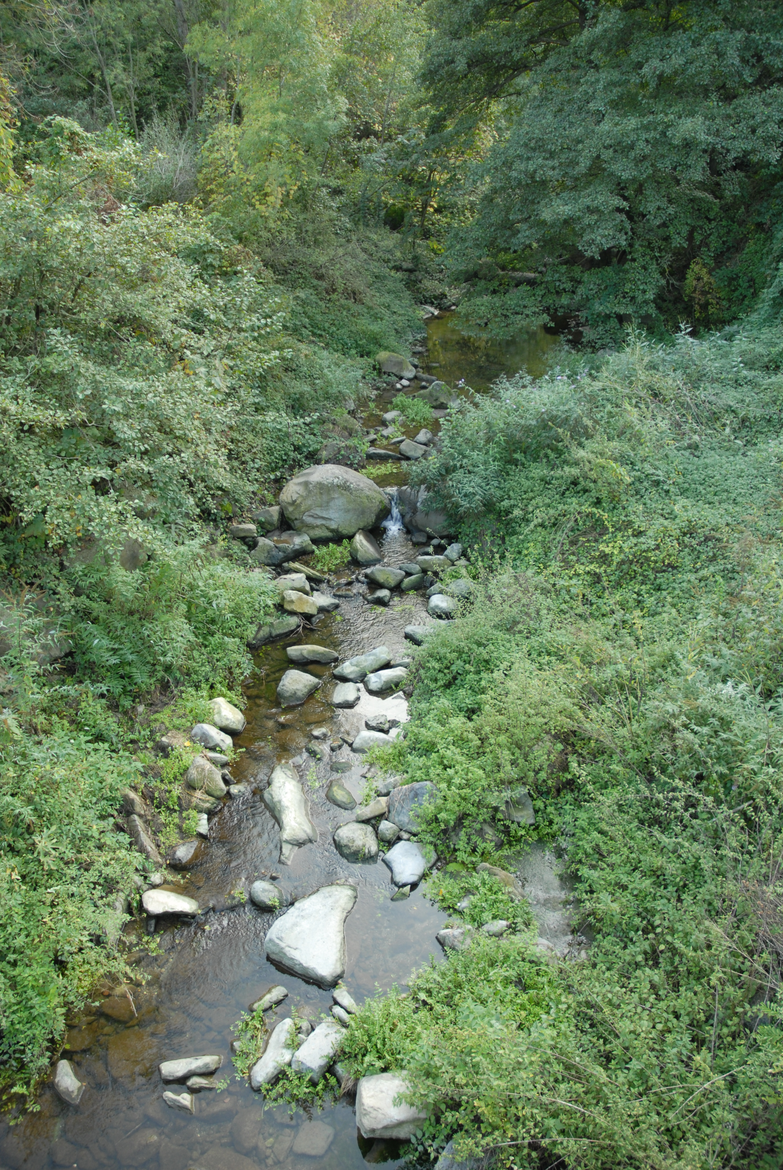 El Toronell a Castellfollit de la Roca This is a a photo of a natural area in Catalonia, Spain, with id: ES510218